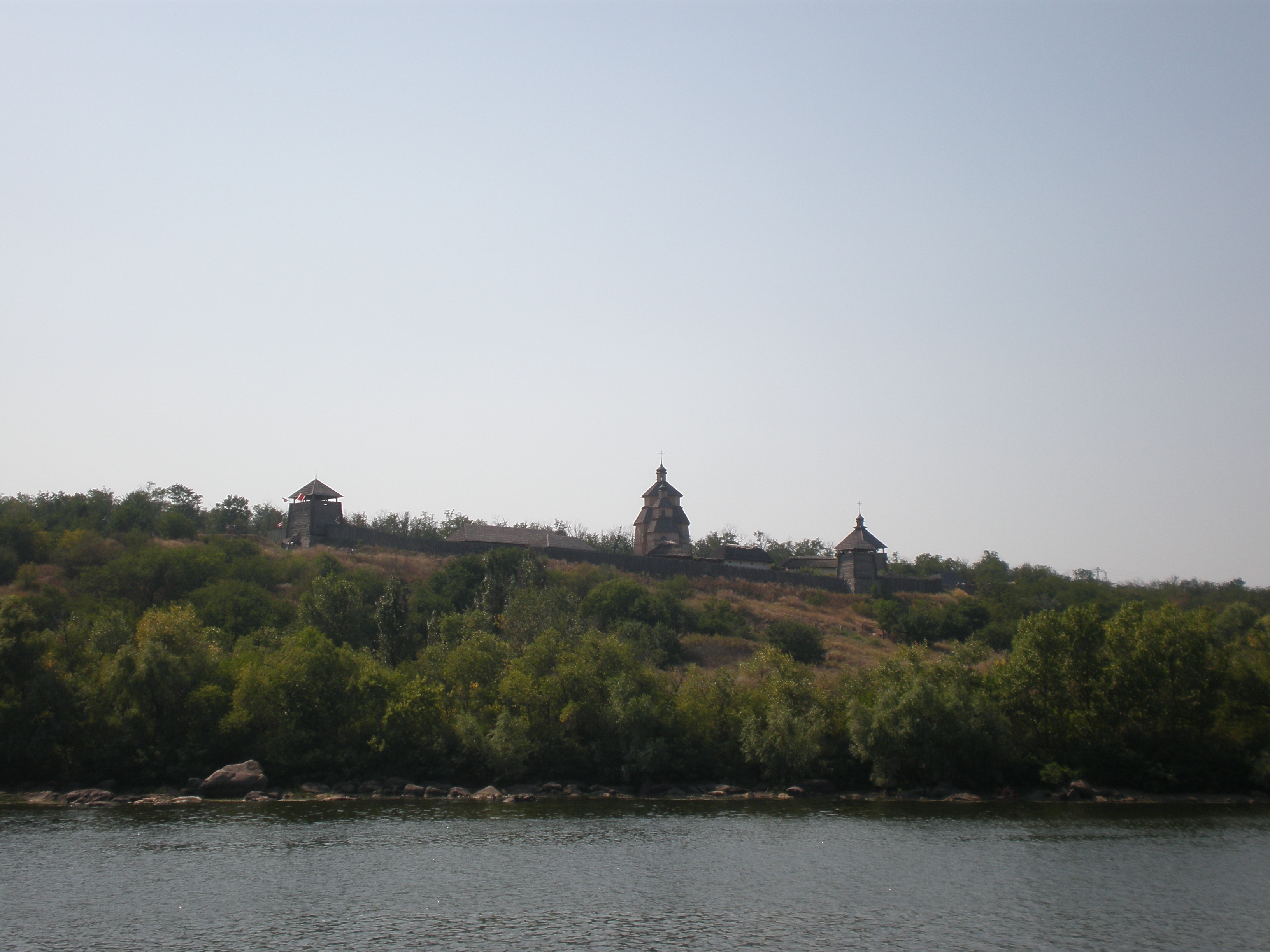 «Дніпровські пороги», м. Запоріжжя, о. Хортиця, о. Байда та скелі посеред р. Дніпро